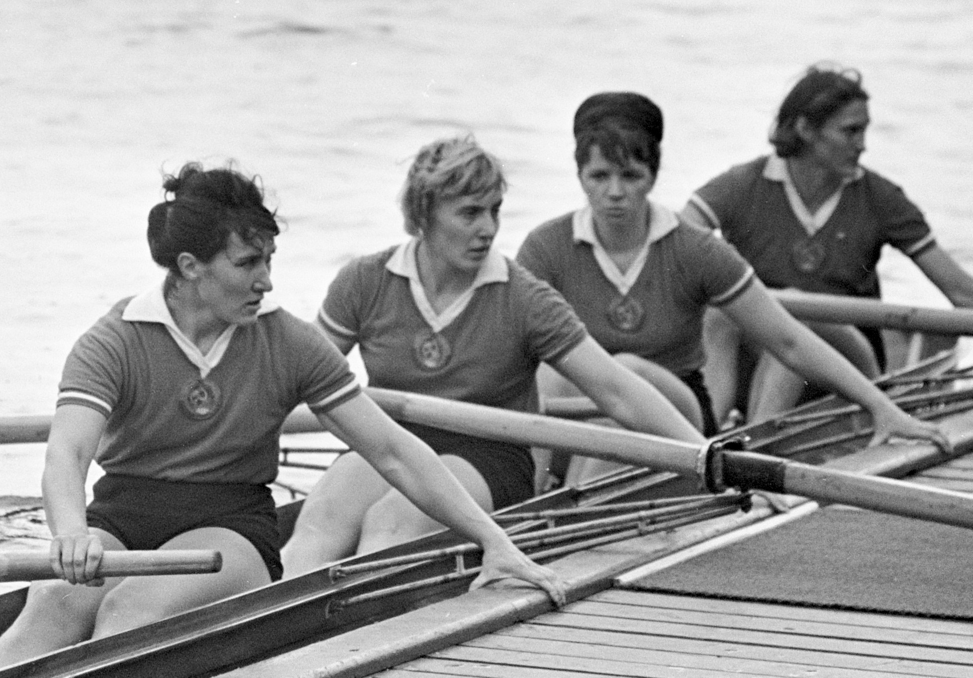 Europese roeikampioenschappen dames in Duisburg, 6. Russische enkel vier, 7 Hollandse enkel vier